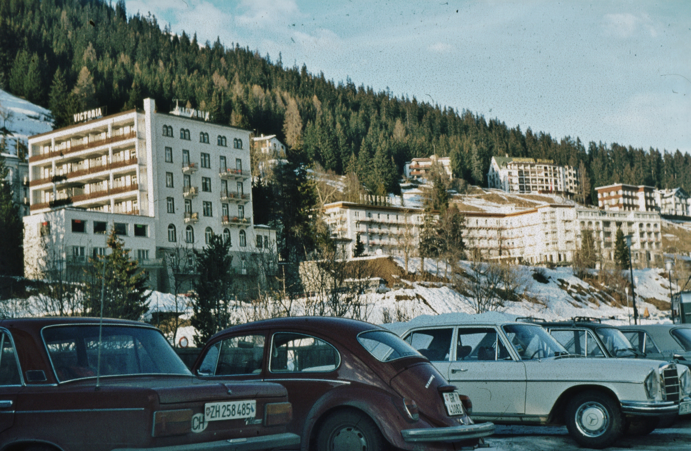 Hotel Victoria, Belvedere, Waldhotel Belvedere, Davos in den 70er Jahren